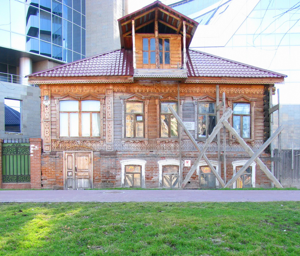 Дом Пестовых на Набережной рабочей молодёжи, 23 в Екатеринбурге, более известный как "Дом Гайдара". На втором этаже этого дома в 1927 году несколько месяцев снимал комнату советский писатель Аркадий Гайдар (Голиков)